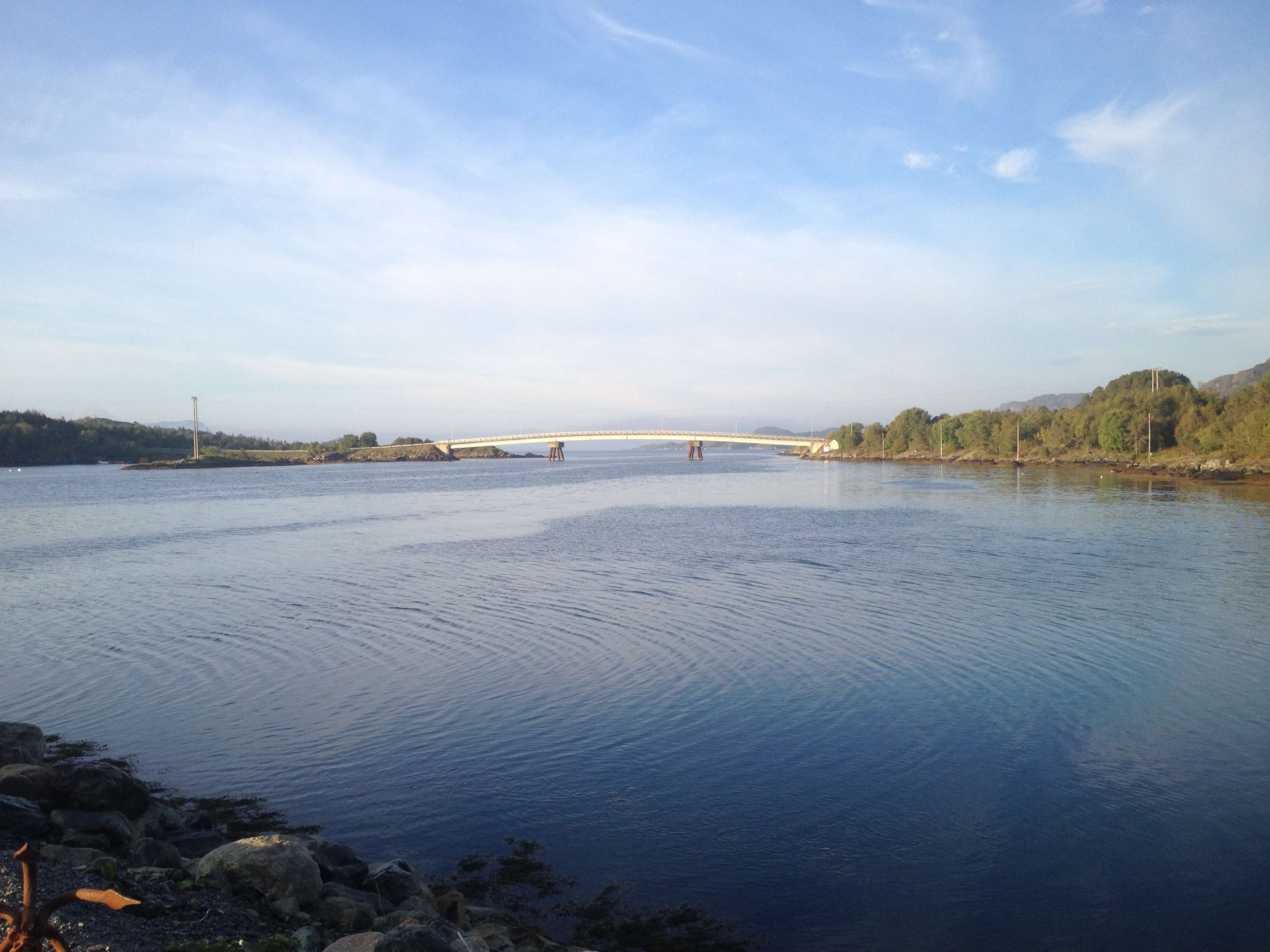 Madsøybrua i Leka kommune